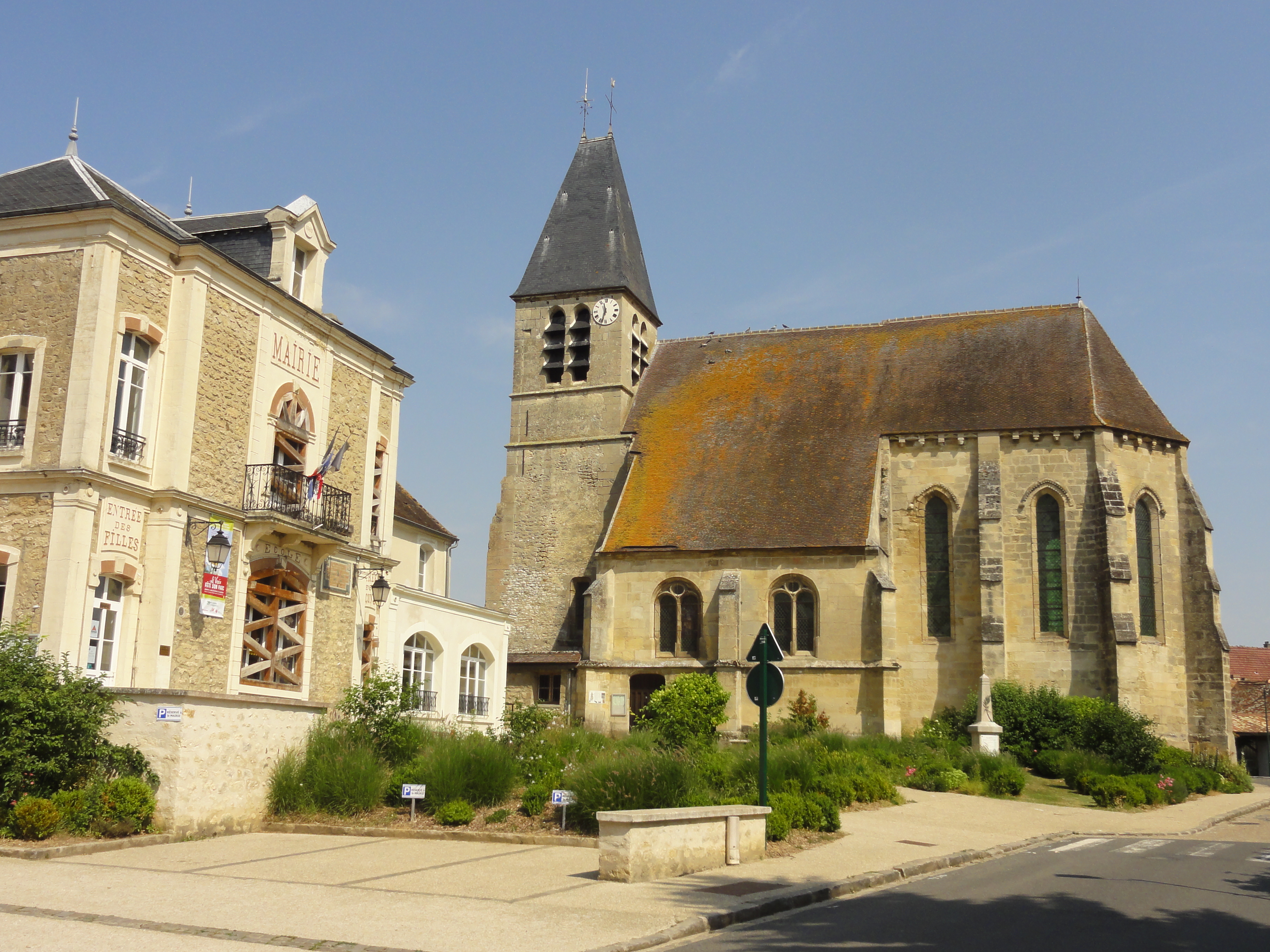 Église Saint-Gildard de Longuesse (voir titre).